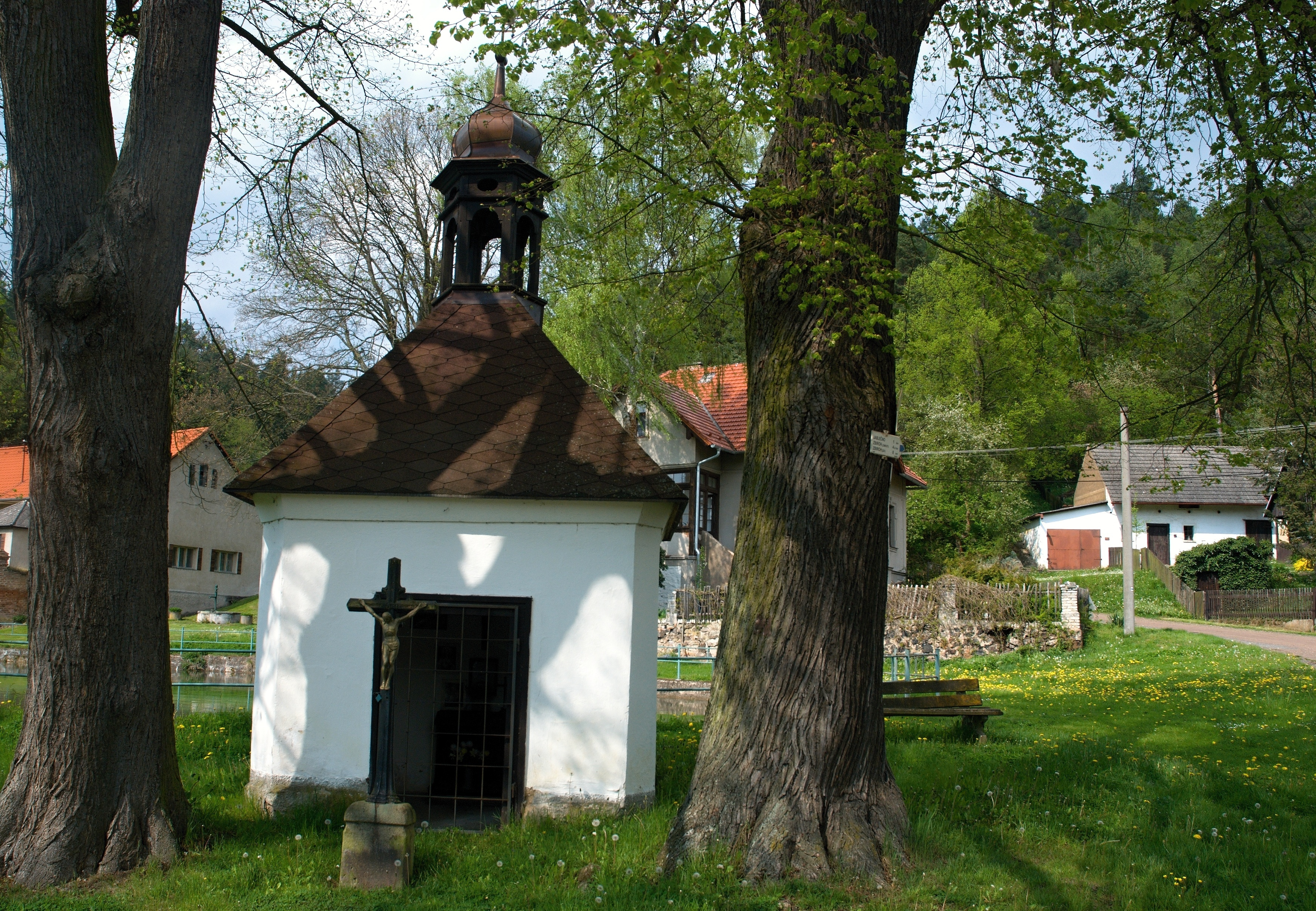 kaplička